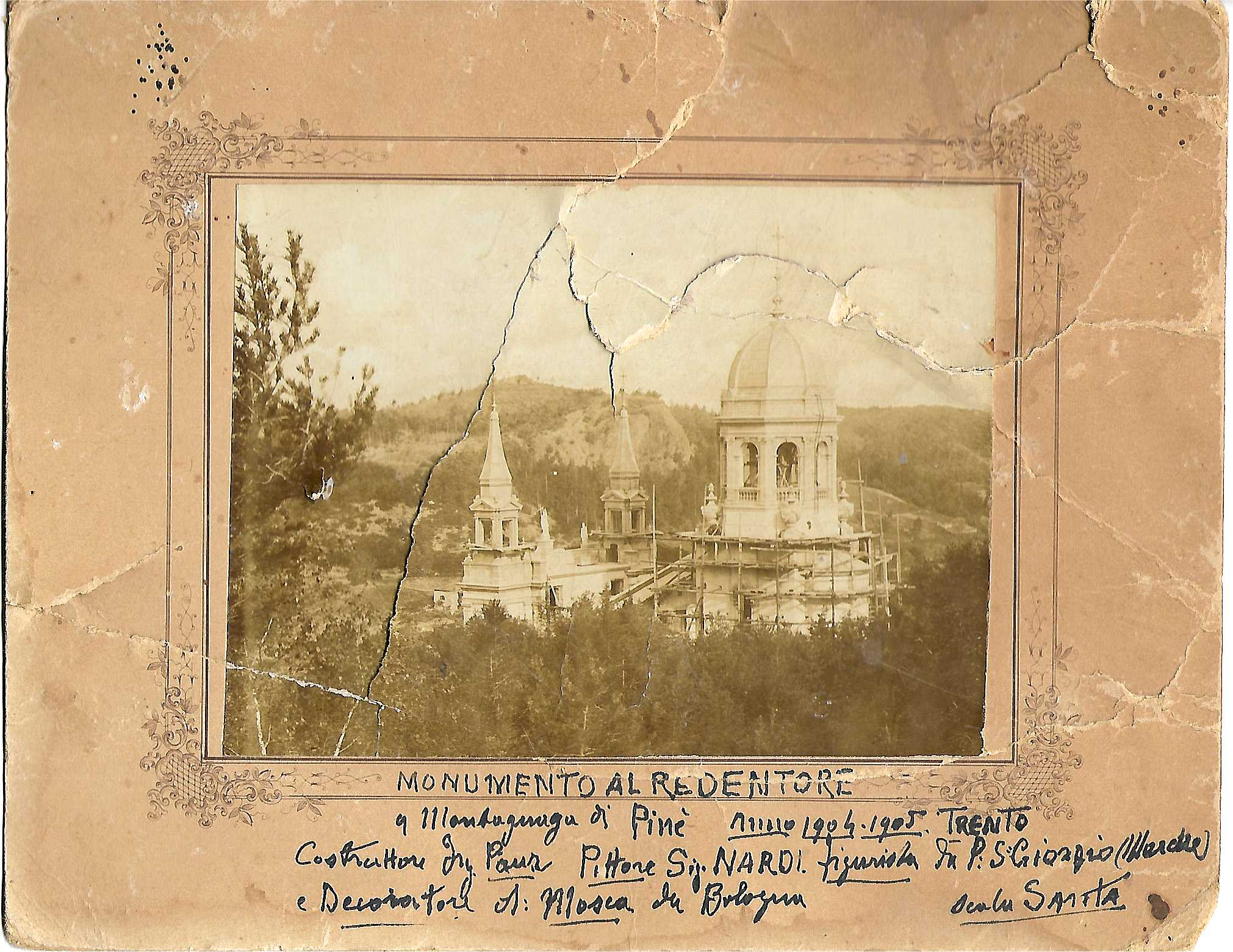 Fotografia che ritrae il monumento al Redentore a Montagnaga di Pinè - Trento - anno 1904-1905 costruttore Ing. Panz - pittore Sigismondo Nardi figurista da Porto San Giorgio Marche - decoratore Antonio Mosca da Bologna - Scala Santa